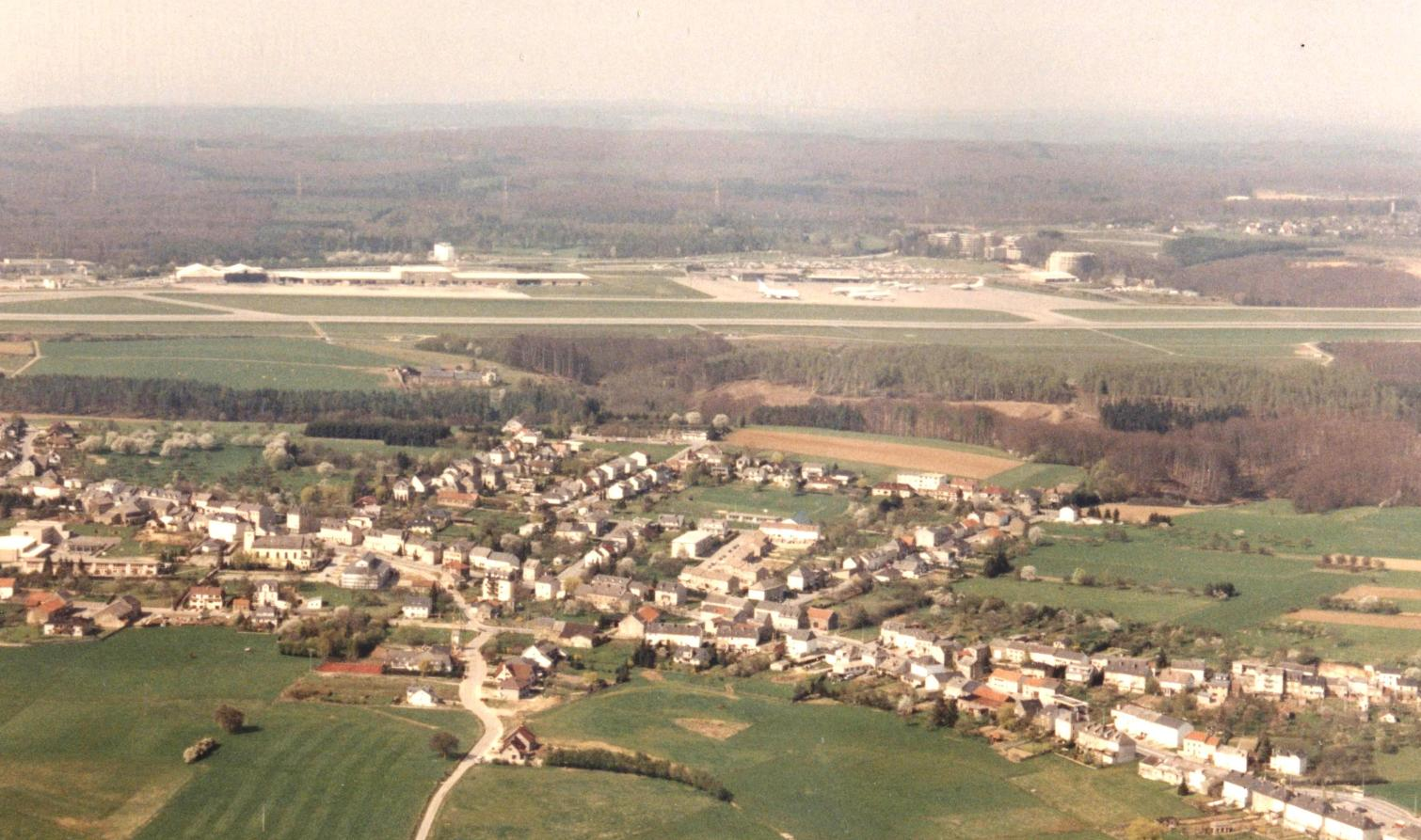 Sandweiler et le Findel (Luxembourg)